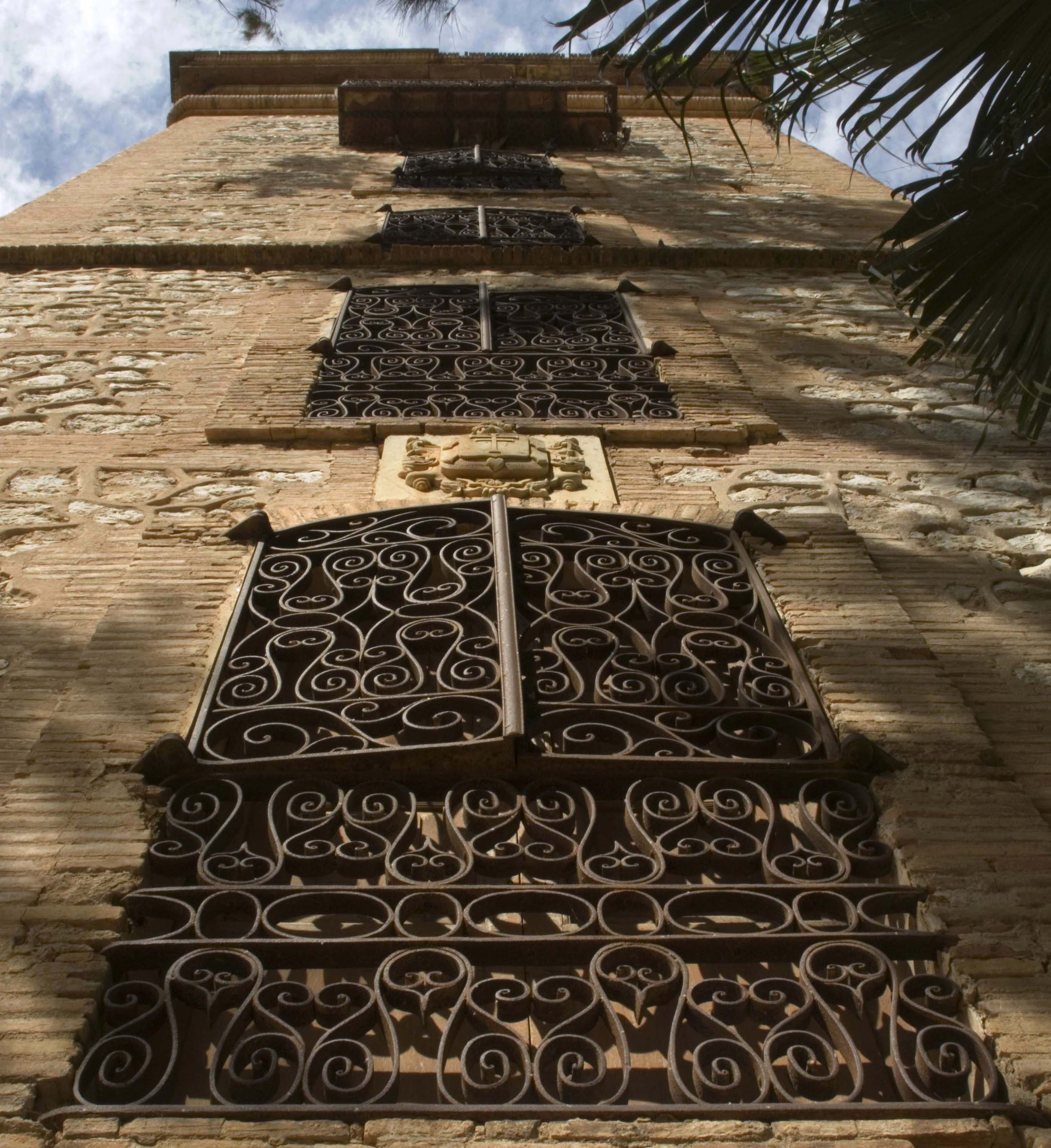 Torre a la Ribera Alta. Segle XIX. Arquitectura burgesa valenciana.